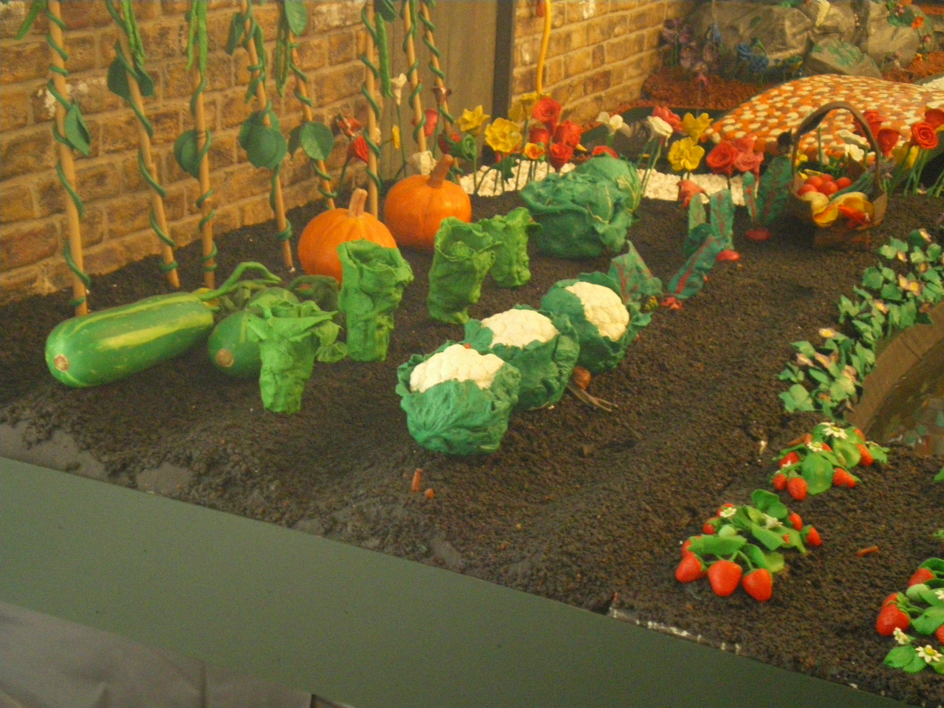 Veg